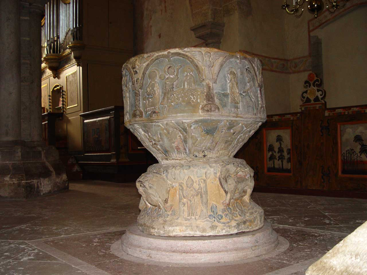 Kirche von Stenkyrka auf Gotland. Taufbecken (12.Jh.)